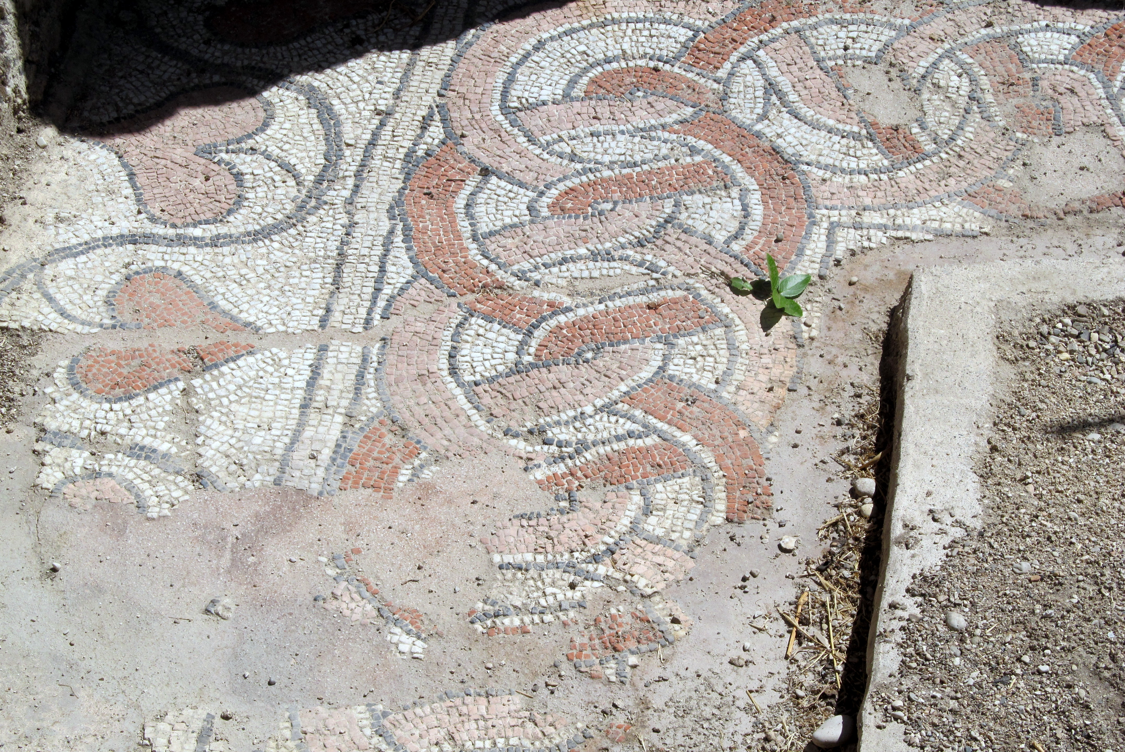 Butrint Albania